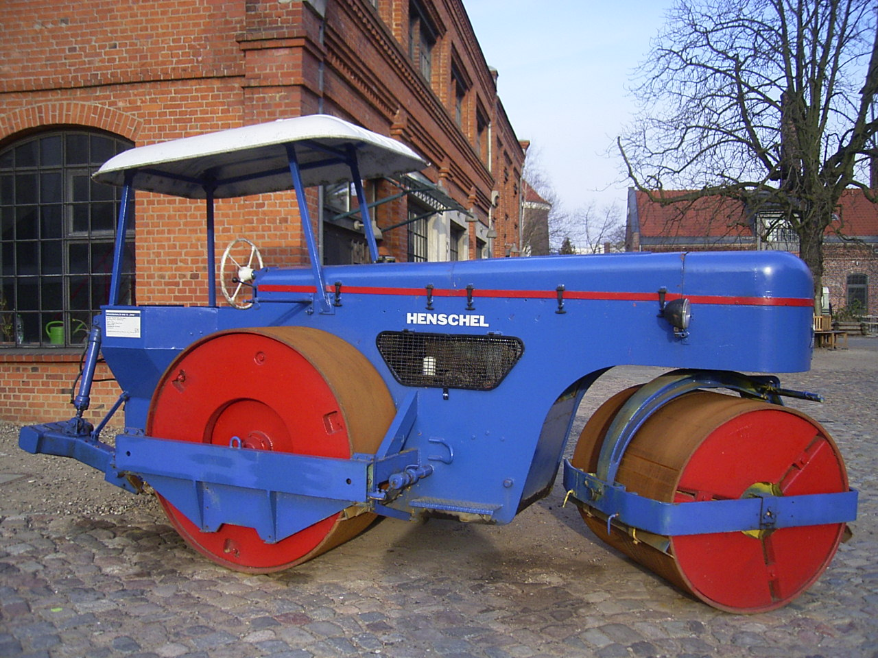 Die Straßenwalze MW 12 wurde 1964 von den Henschel-Werken in Kassel gebaut. Sie steht heute vor dem Museum der Arbeit in Barmbek-Nord.